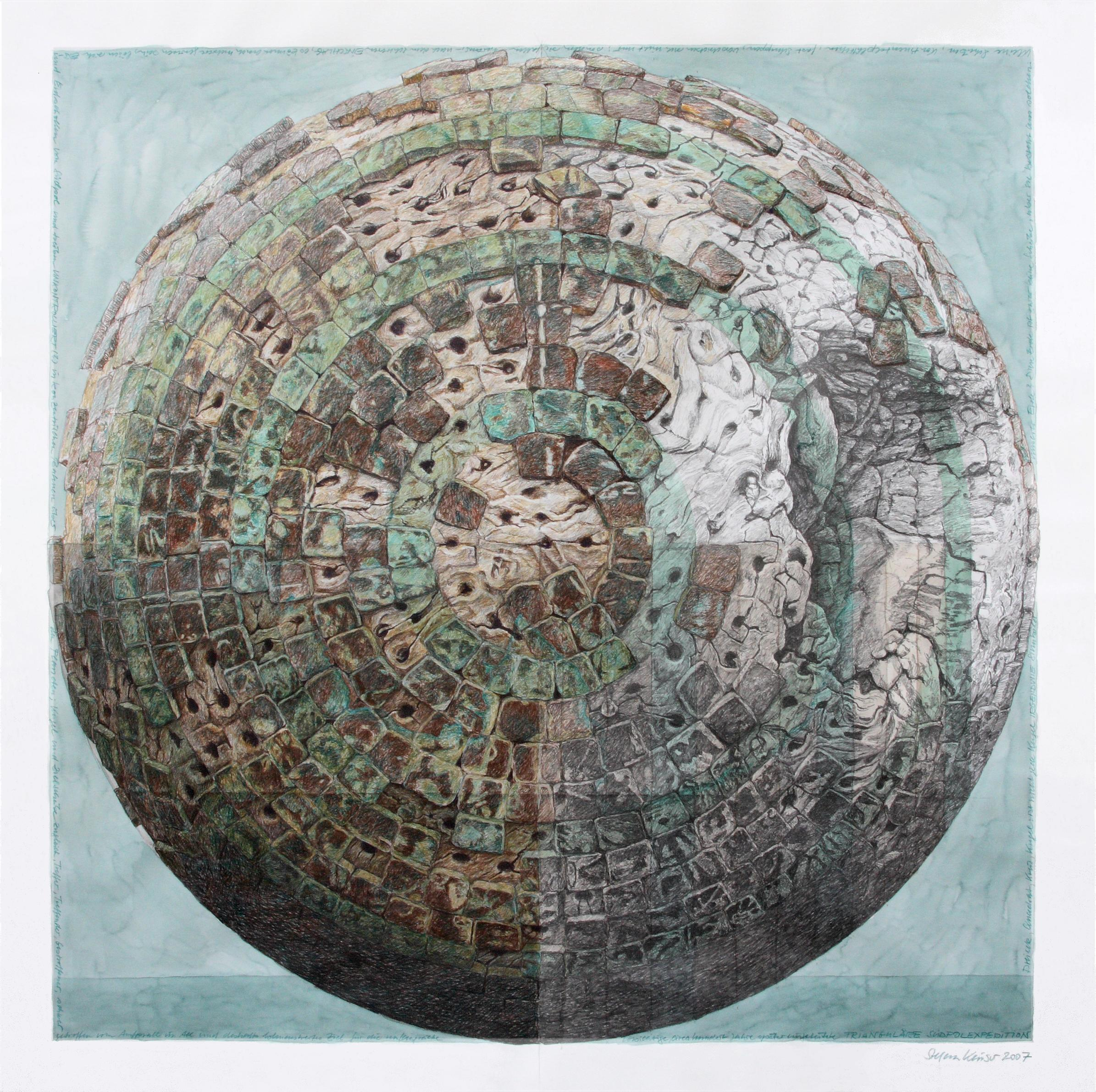 Trianguläre Südpolexpedition (200), Farbstift, Bleistift, Aquarell